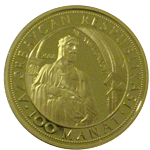 Nizami Gəncəvinin xatirəsinə həsr olunmuş qızıl sikkə